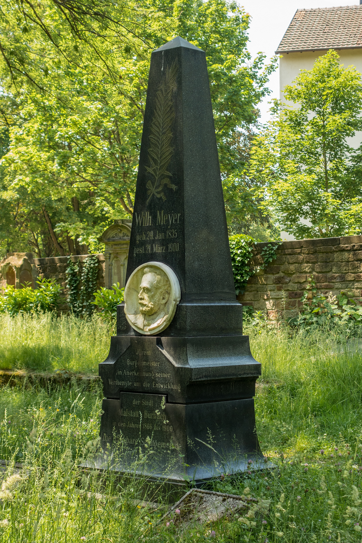 Das Ehrengrab von Johann Peter Wilhelm Meyer auf dem Alten Malstatter Friedhof am Jenneweg in Saarbrücken.